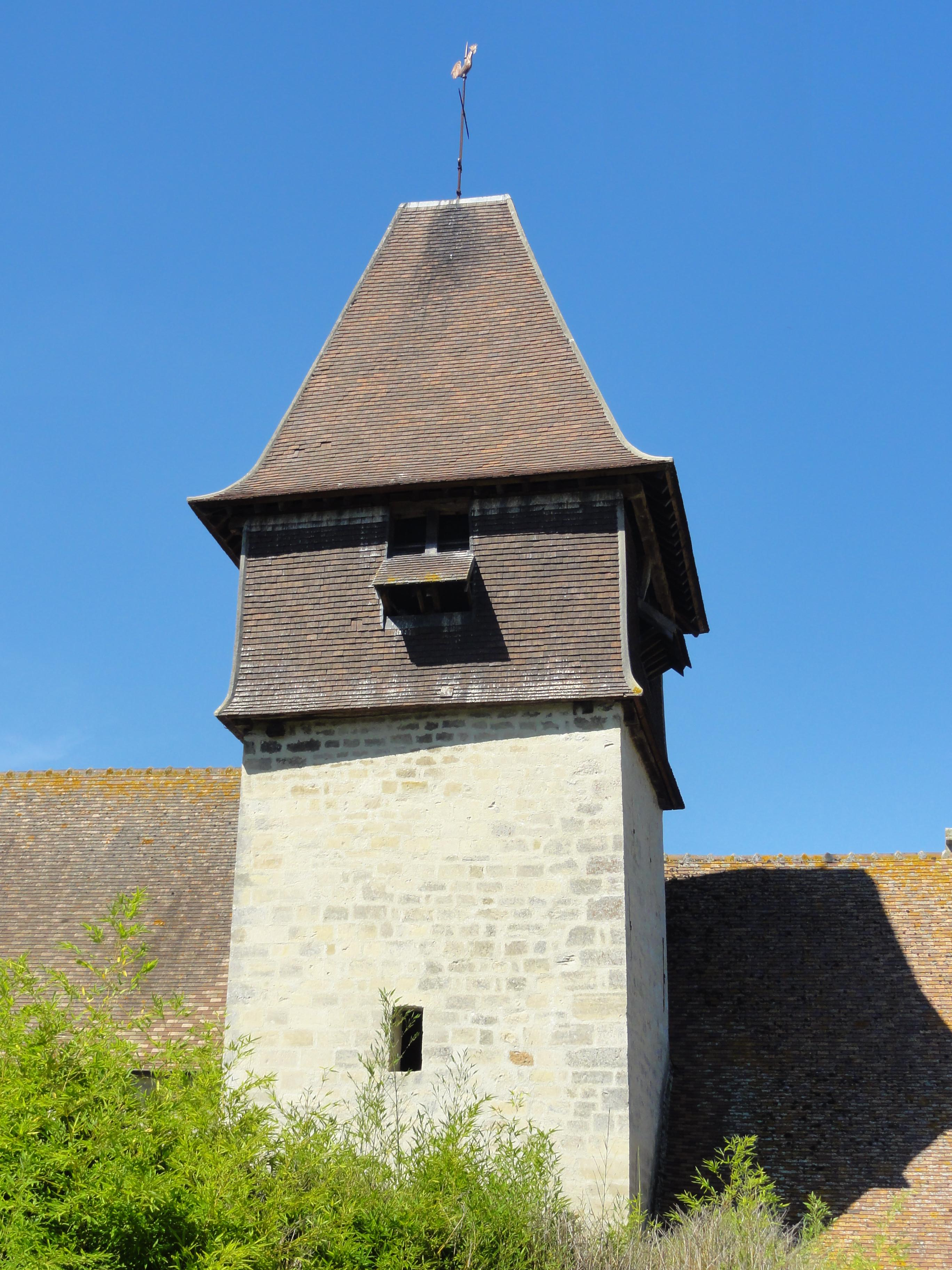 Clocher.